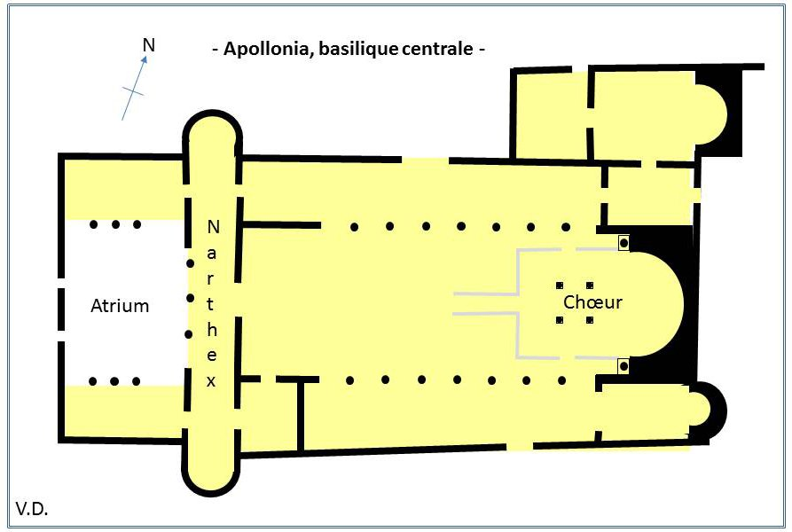 Plan schématique de la basilique byzantine centrale d'Apollonia